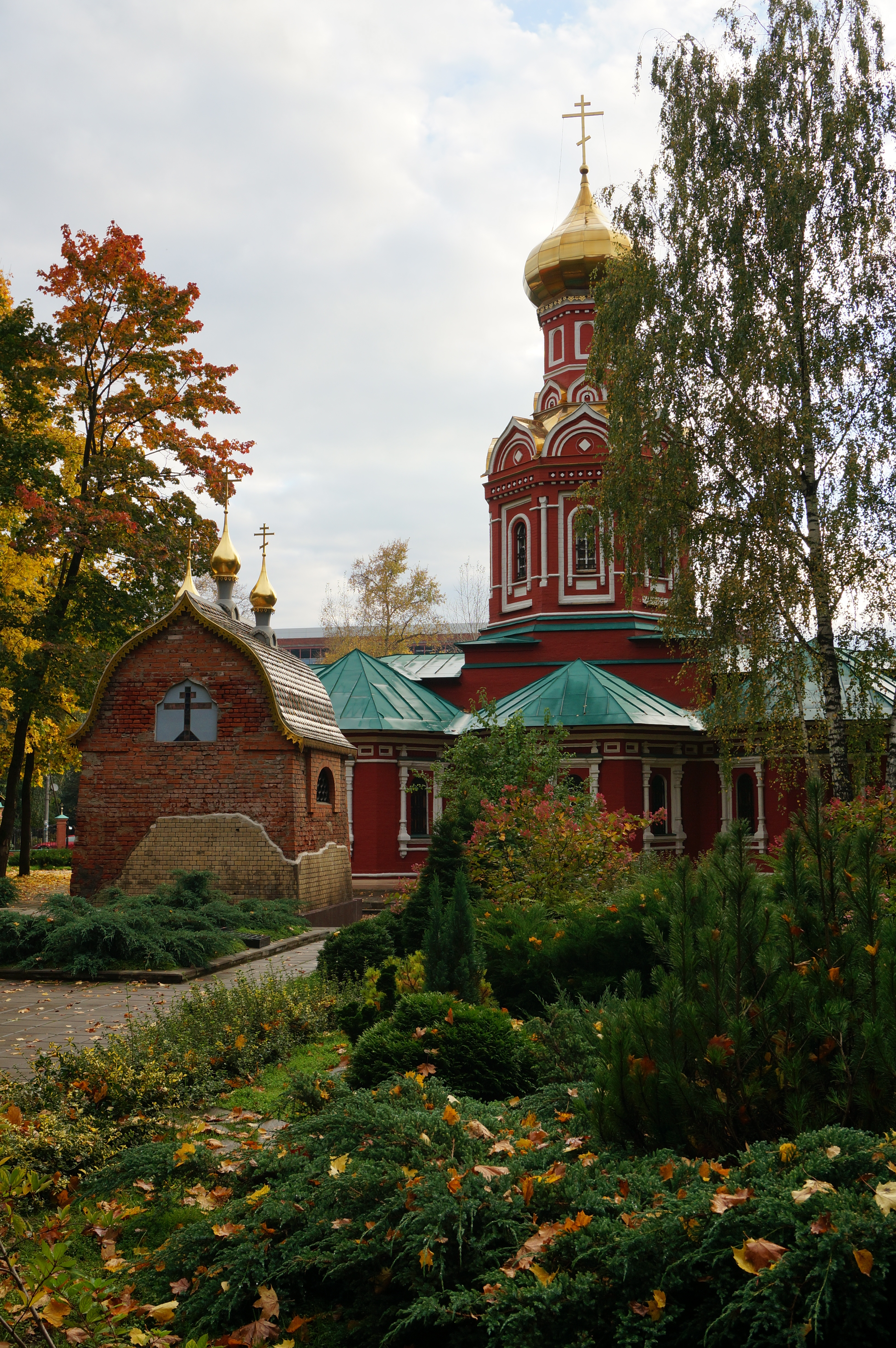 Часовня-усыпальница Полякова А. Я. (Москва и Московская область, Красногорск, Райцентр улица)